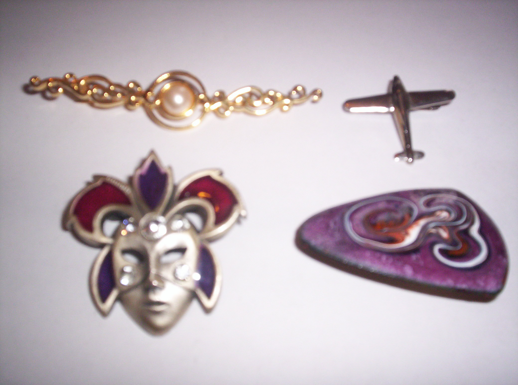 brooch.jpg